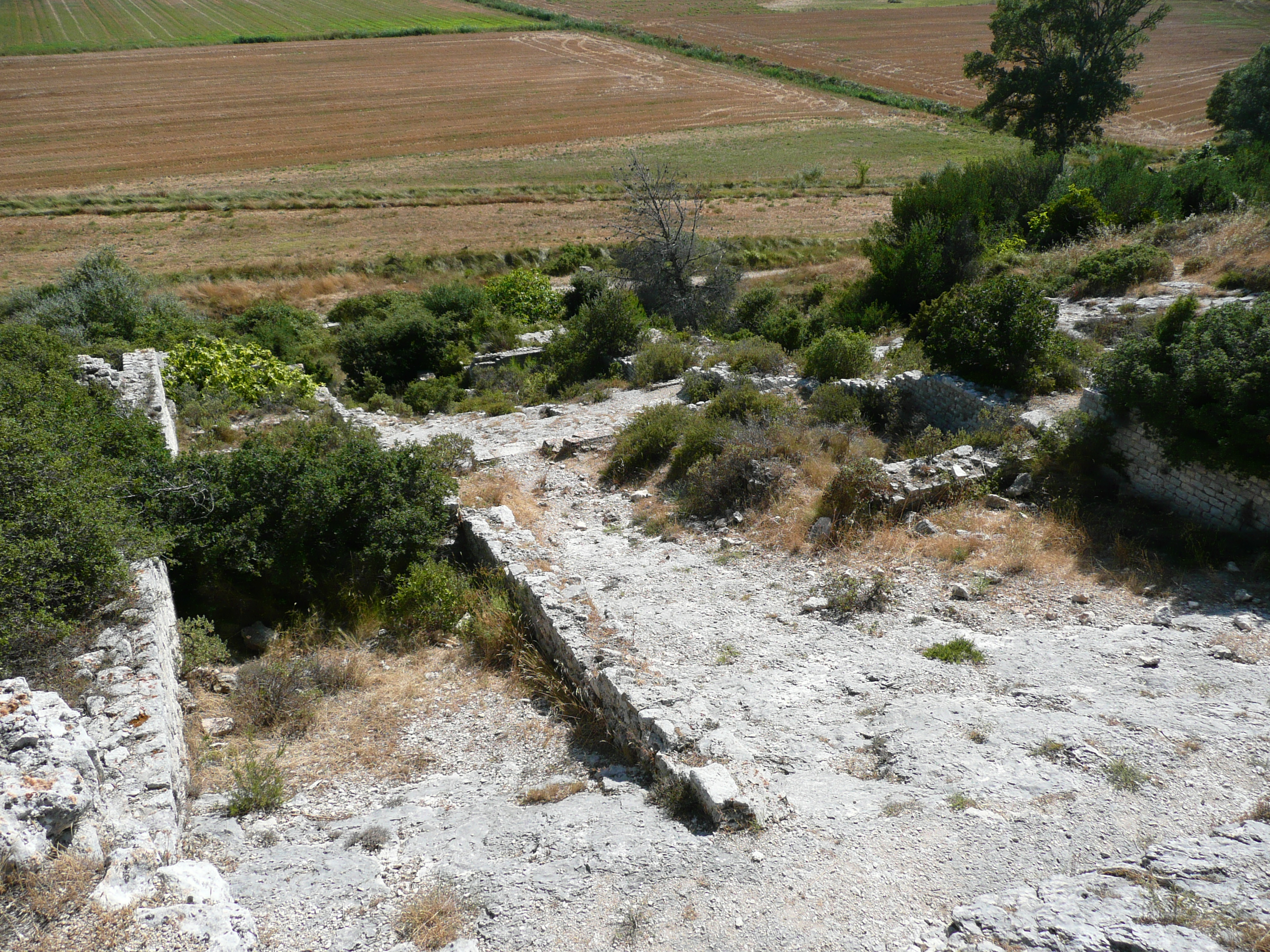 Barbegal mill